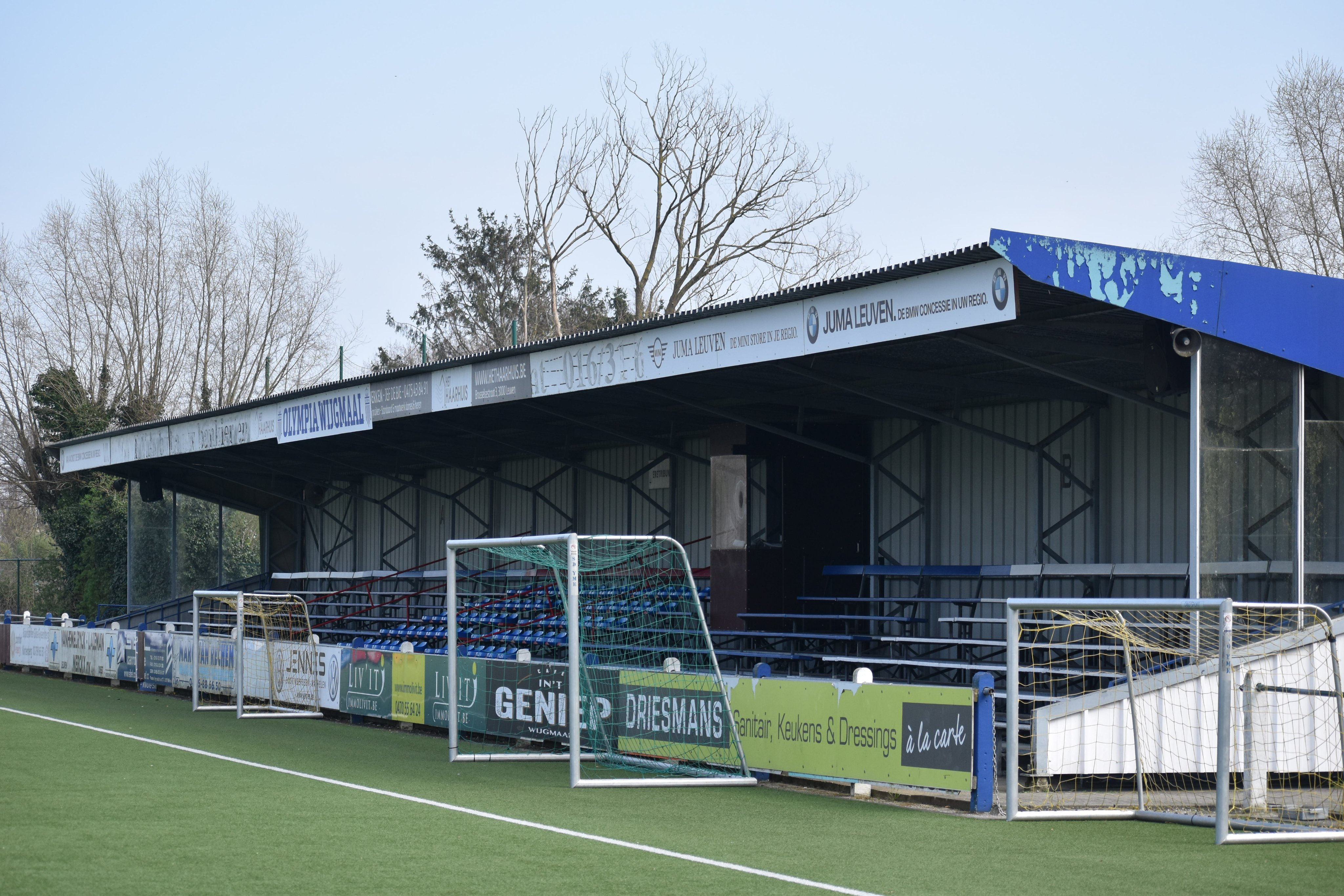 De tribune